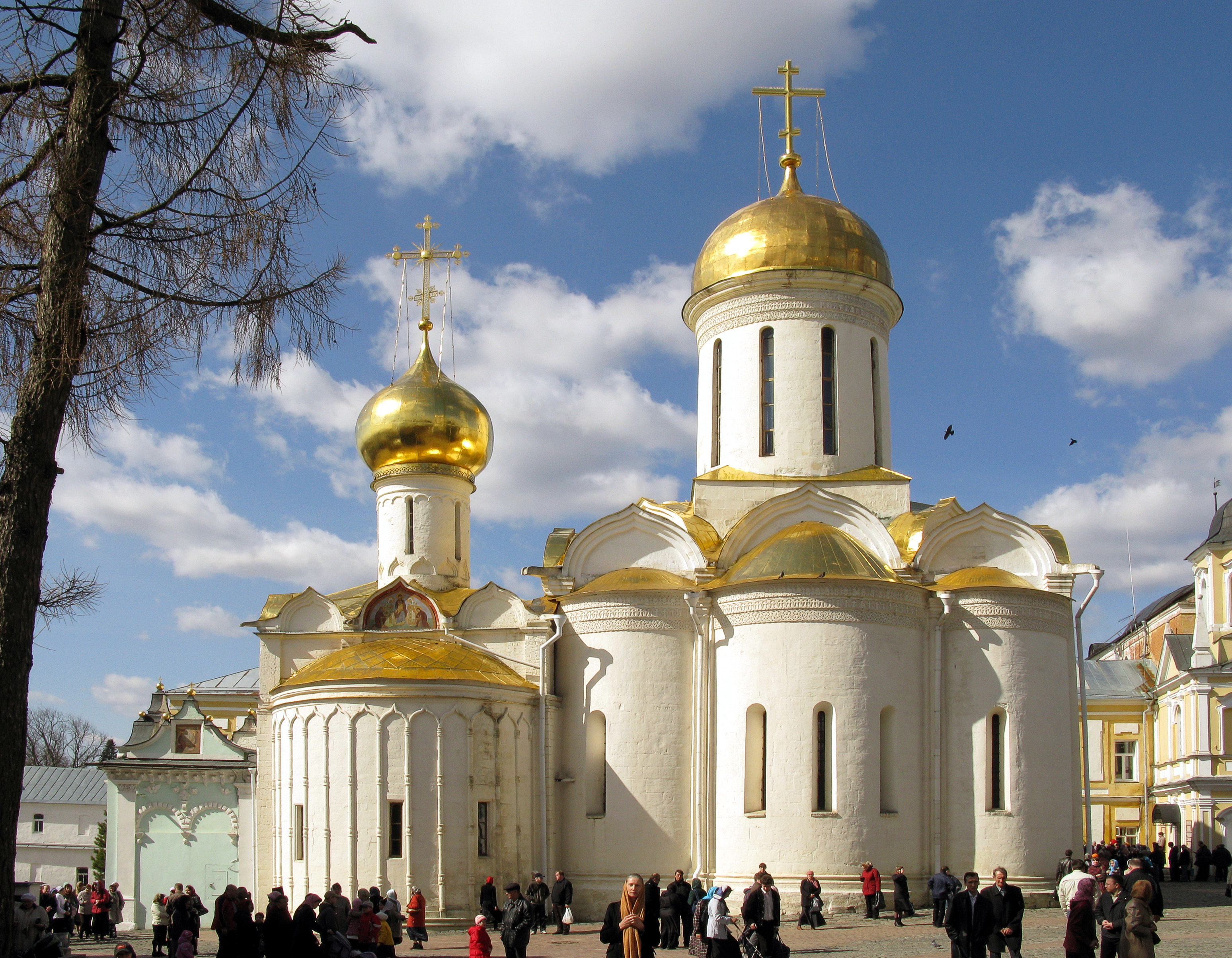 Троицкий собор Свято-Троицкой Сергиевой Лавры. 1422 год. Слева Никоновская церковь. (Сергиев Посад)